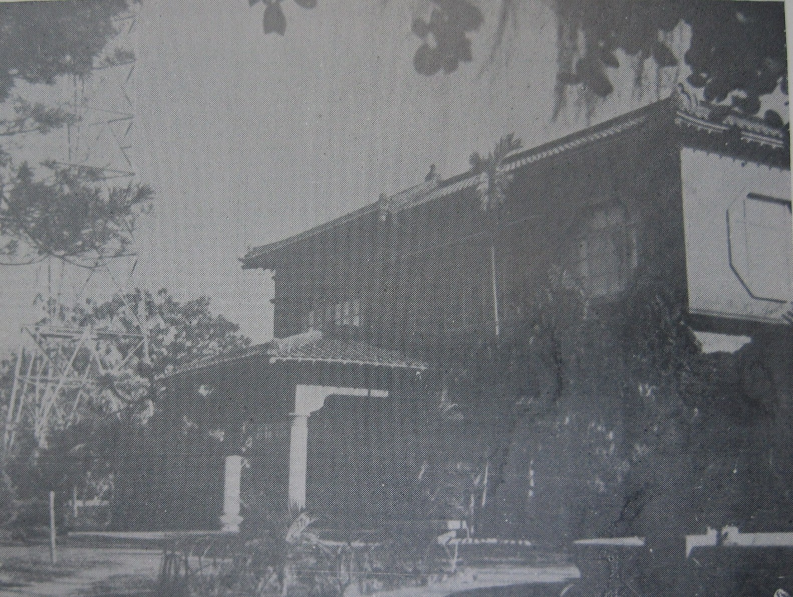 中廣時期的原臺南放送局廳舍